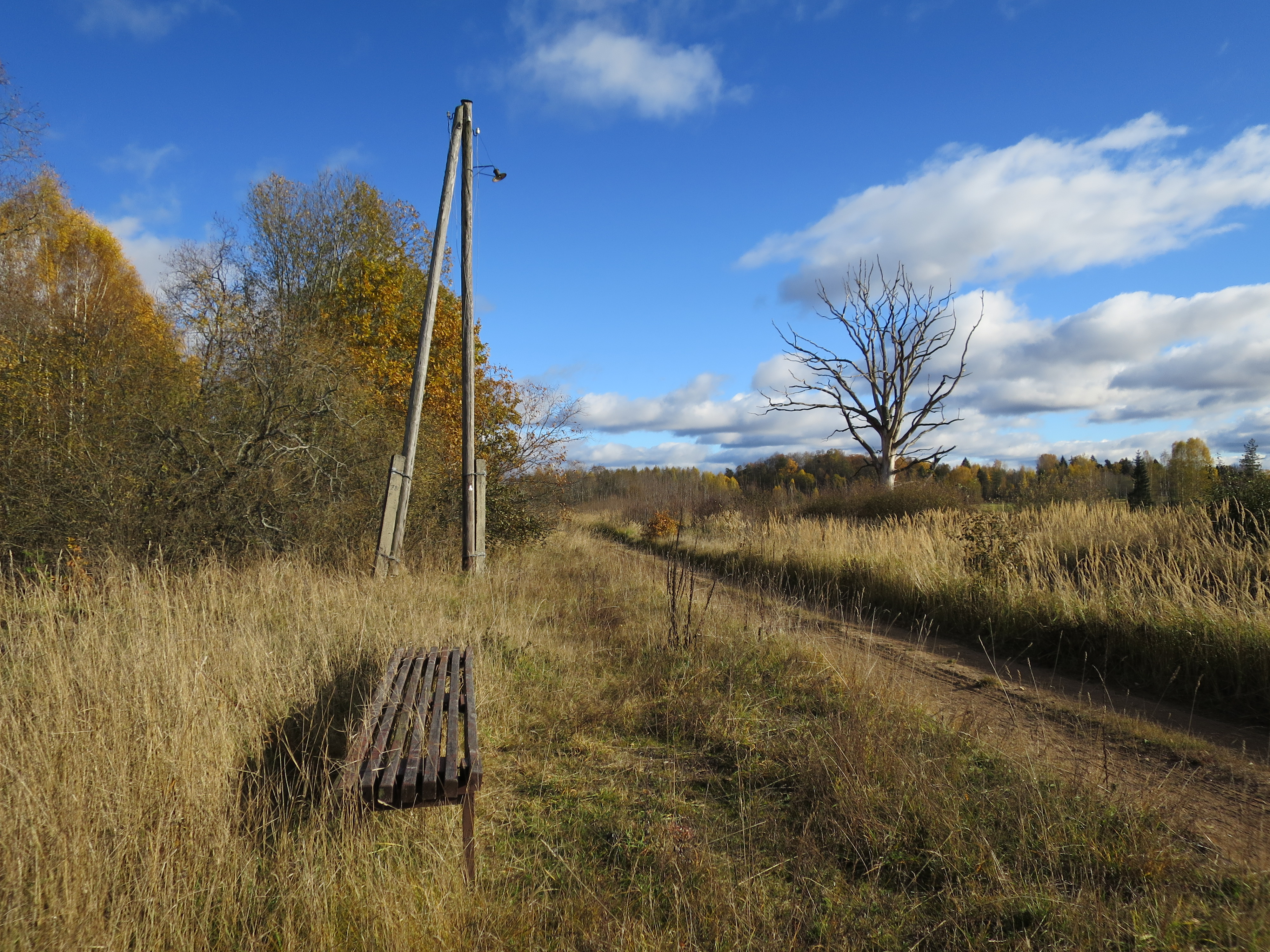 Baltavas pieturas atrašanās vieta